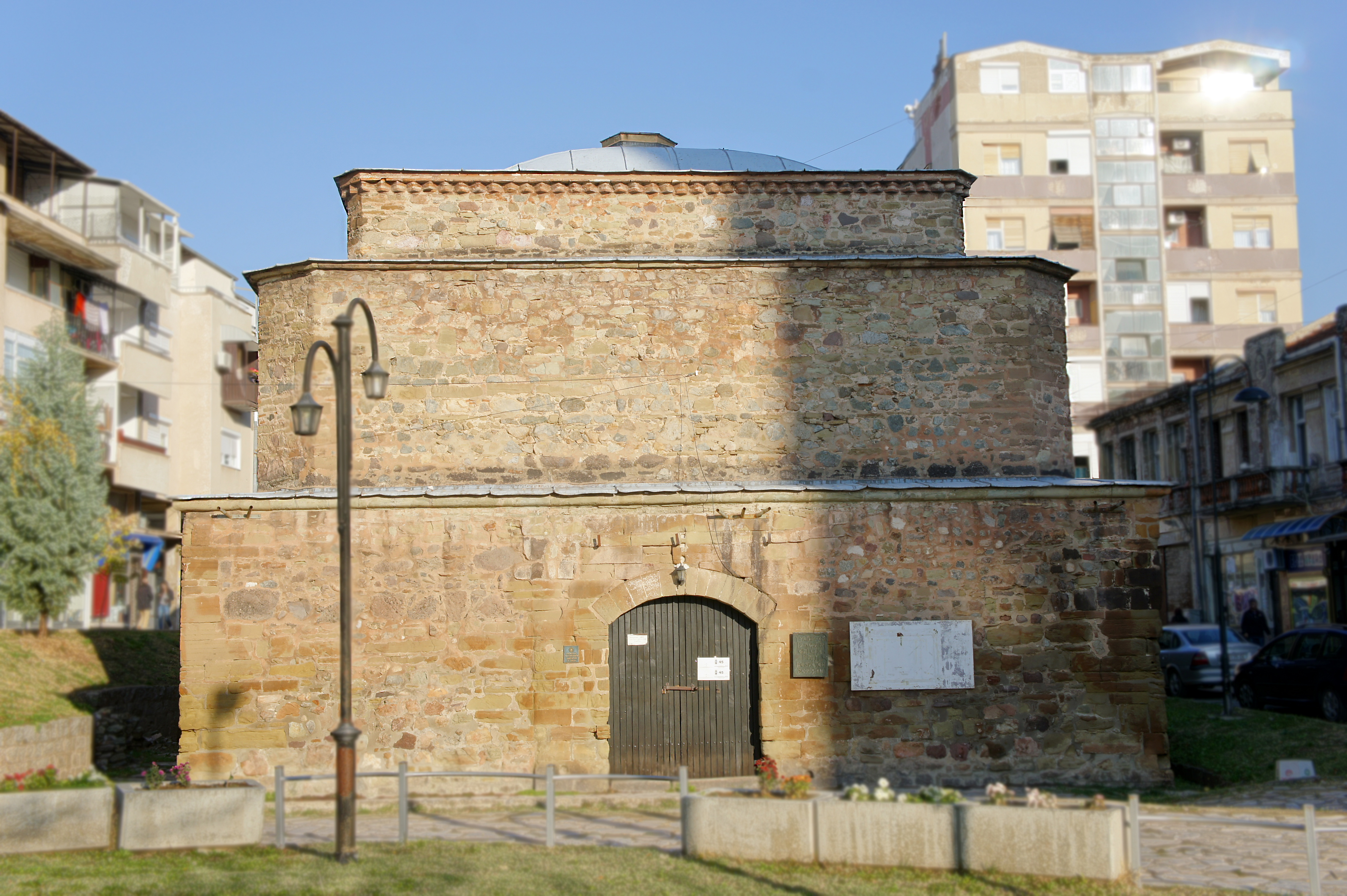 Во центарот на Штип се наоѓа Безистенот, кој бил изграден во 1662 година и служел како затворен пазар, а денес претставува уметничка галерија.